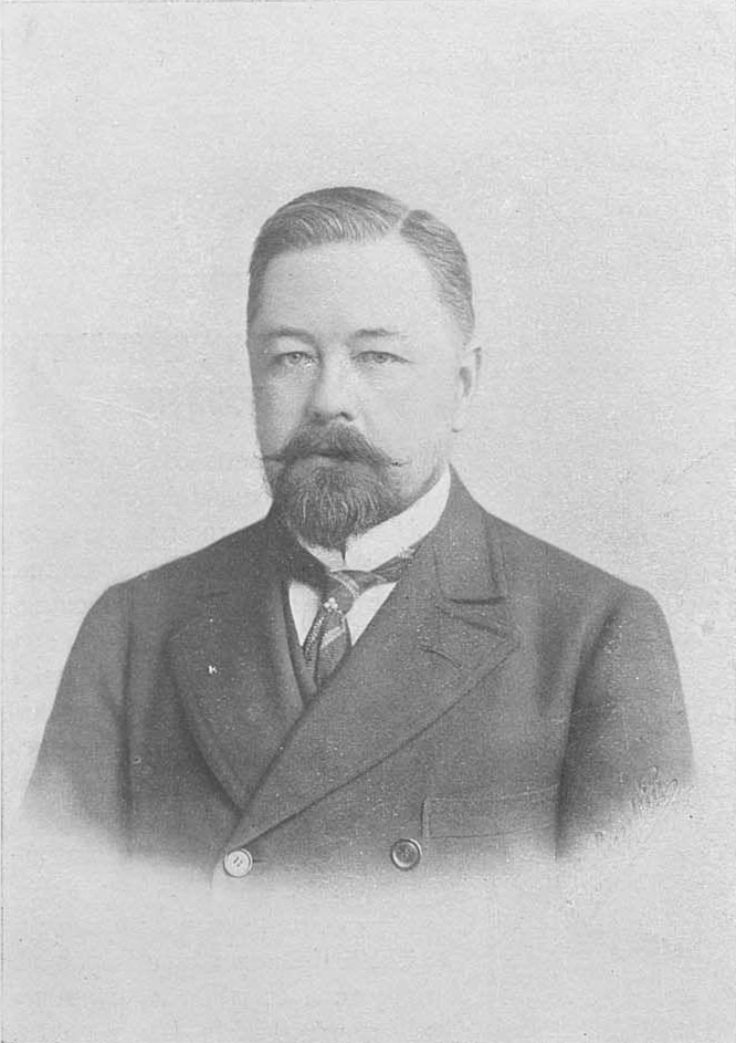 Князь Алексей Дмитриевич Оболенский, член Государственного Совета